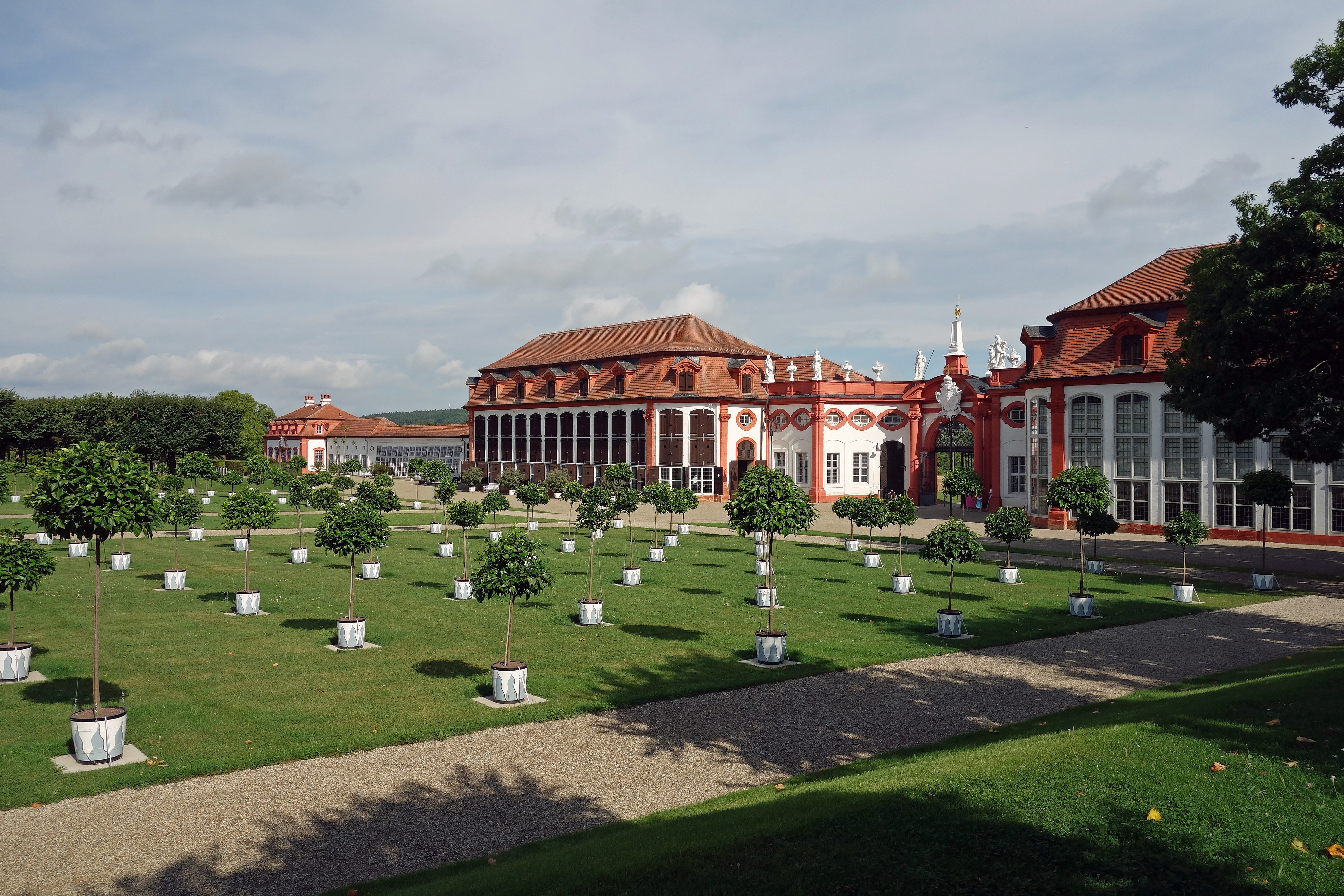 Schloss Seehof, Orangerie